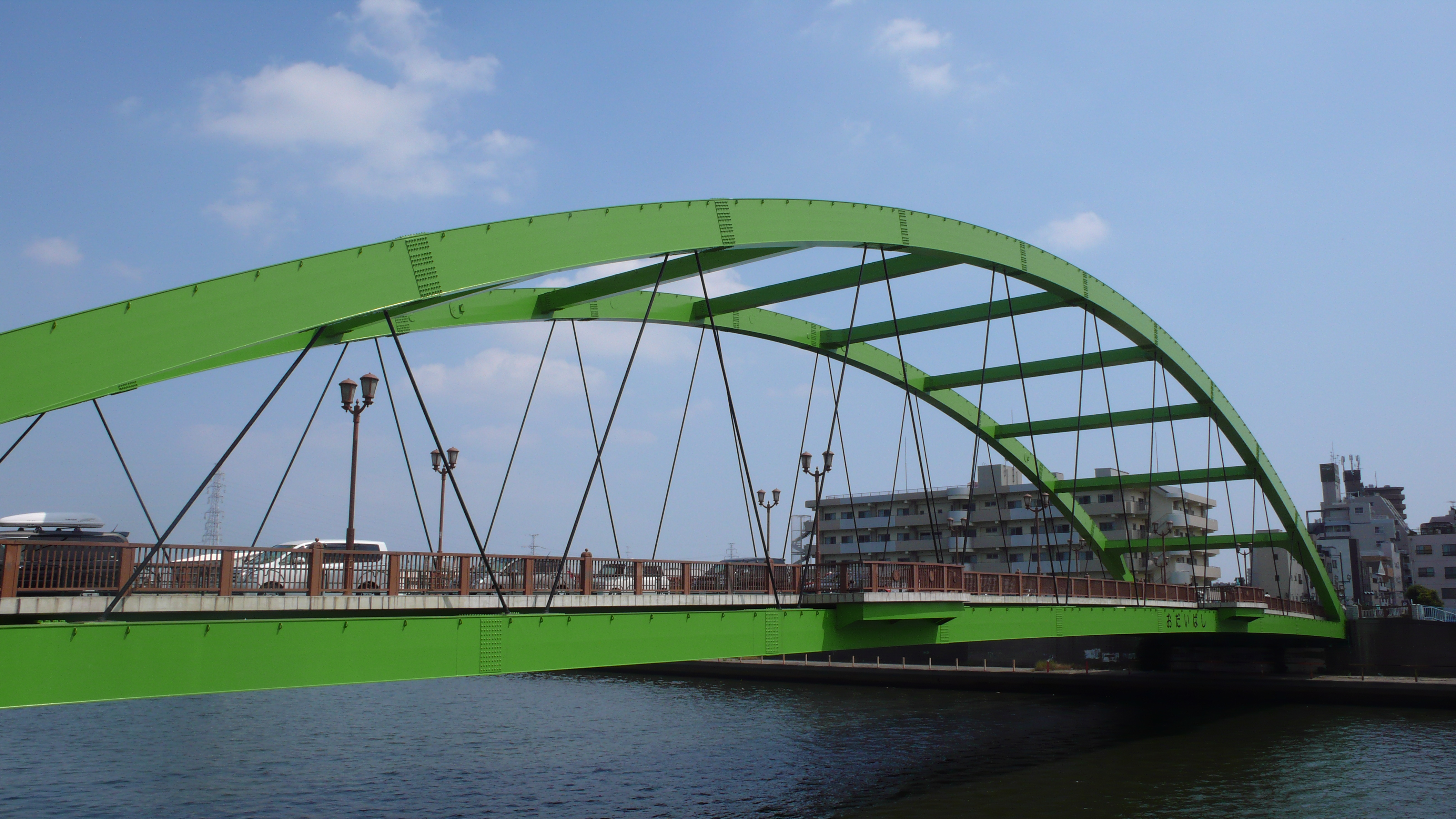 隅田川に架かる小台橋を足立区側から撮影。